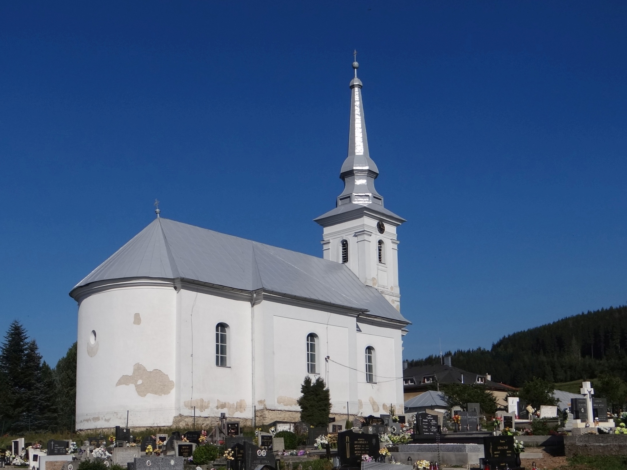 Šumiac